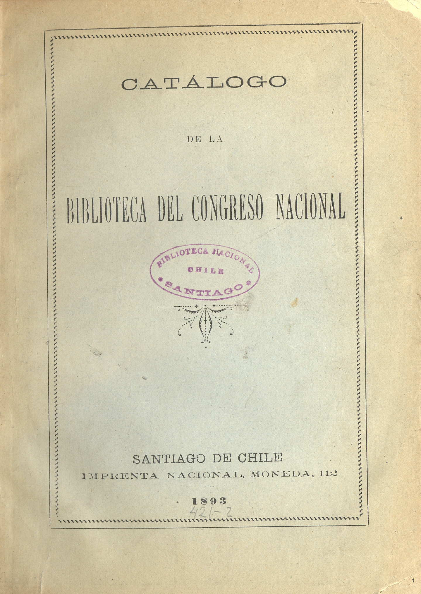 Imprenta Nacional, Moneda112, Santiago de Chile (1893).